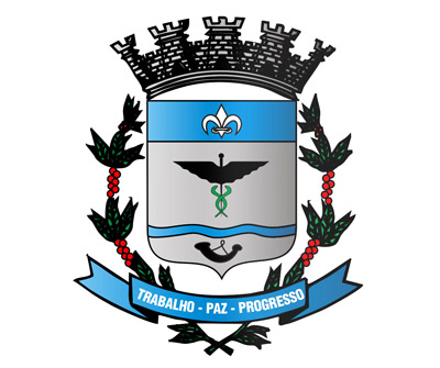 Brasão de Tupi Paulista